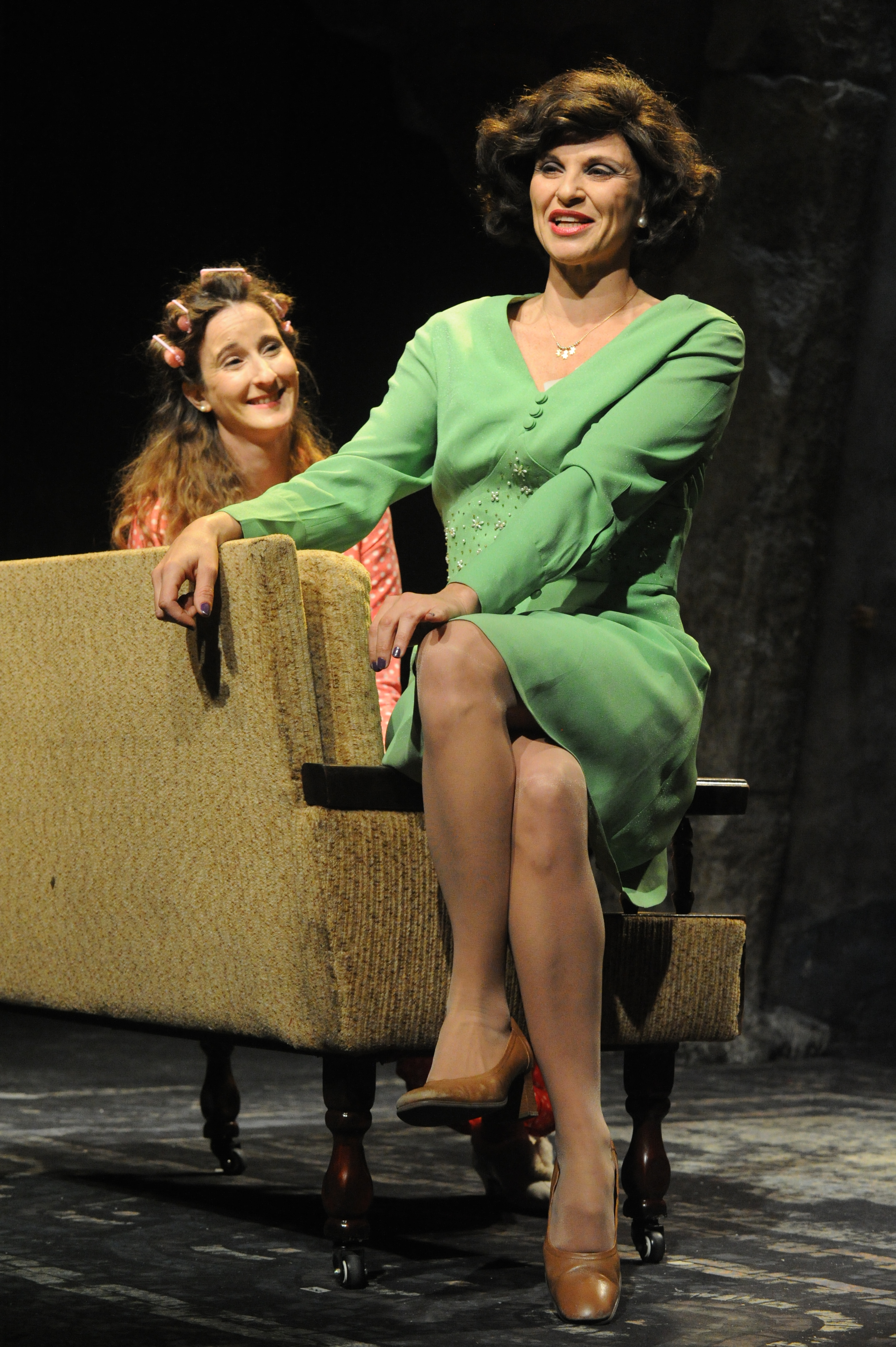 כרמית מסילתי-קפלן ואורית גל בהצגה "חוקר פרטי", מאת ובבימויו של מיקי גורביץ', תיאטרון החאן, 2011